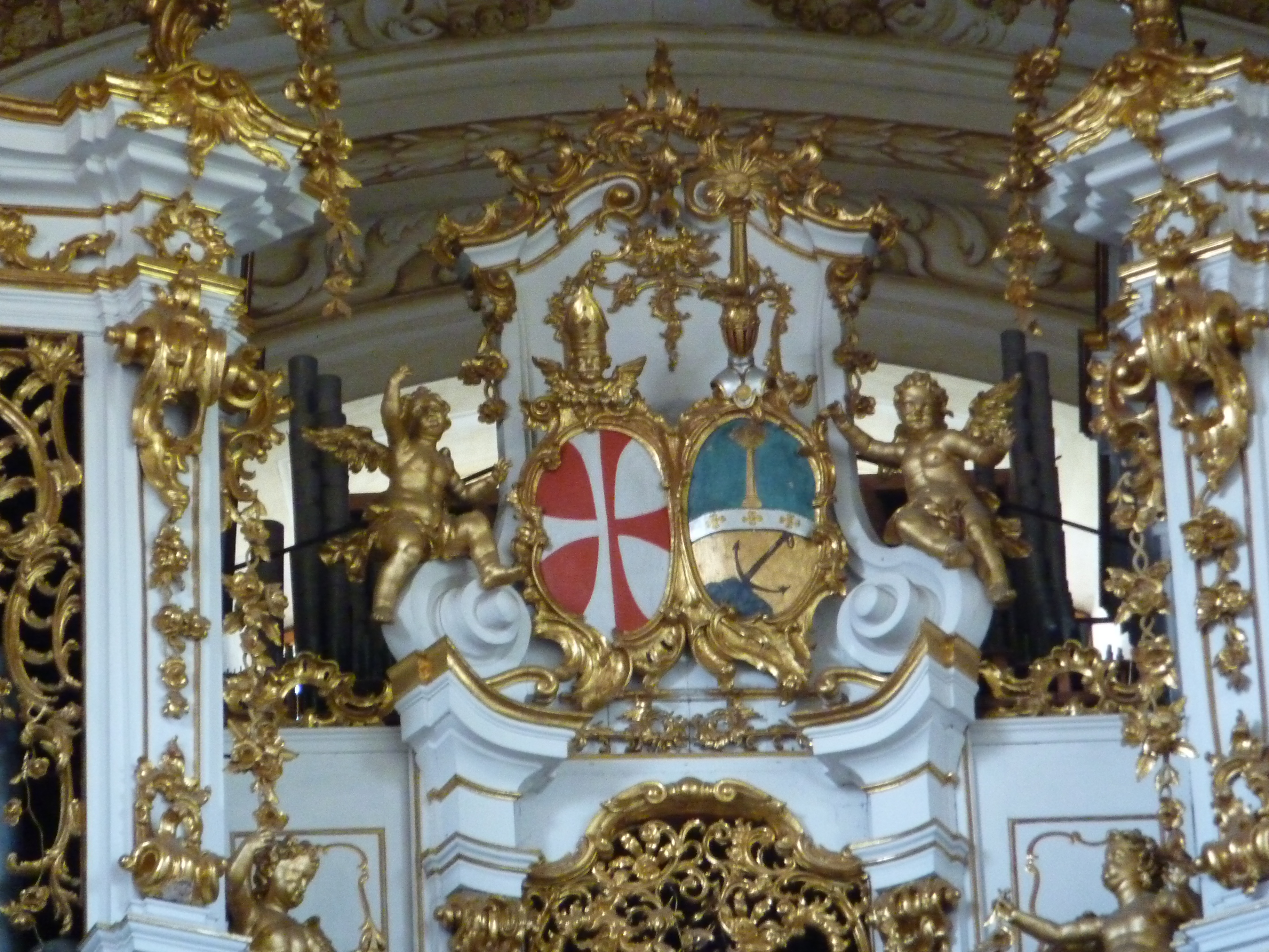 Stift St. Florian, Stiftsstraße 1, St. Florian, Oberösterreich - Wappenkartusche von Propst Matthäus Gogl (?) an der Brucknerorgel der Stiftskirche